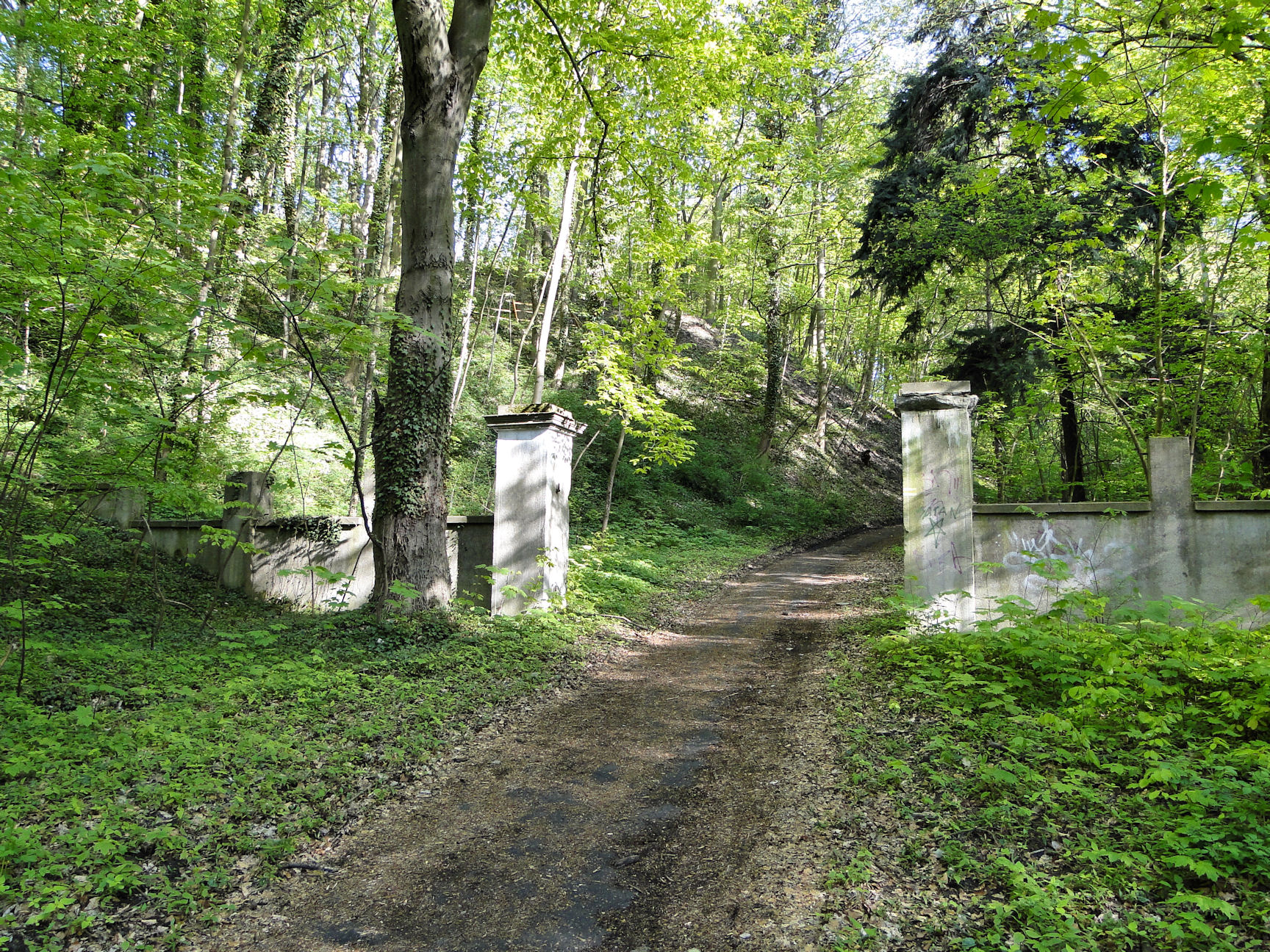 Ruiny pałacu Toepffera przy ul. Grabowej w Szczecinie Zdrojach